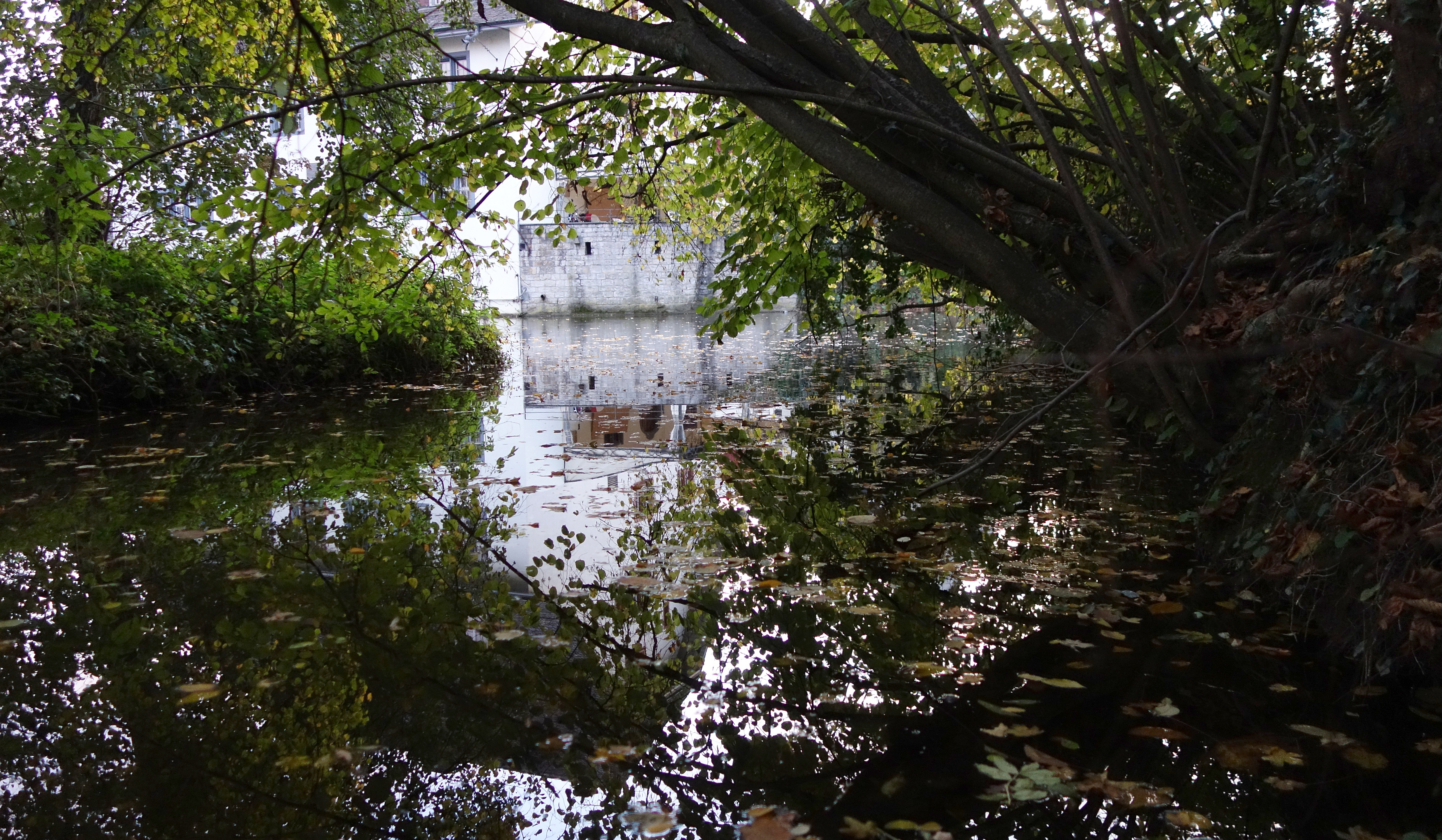 Violenbach in Kaiseraugst bei der Mündung in die Ergolz, welche ihrerseits nach wenigen Metern in den Rhein mündet.